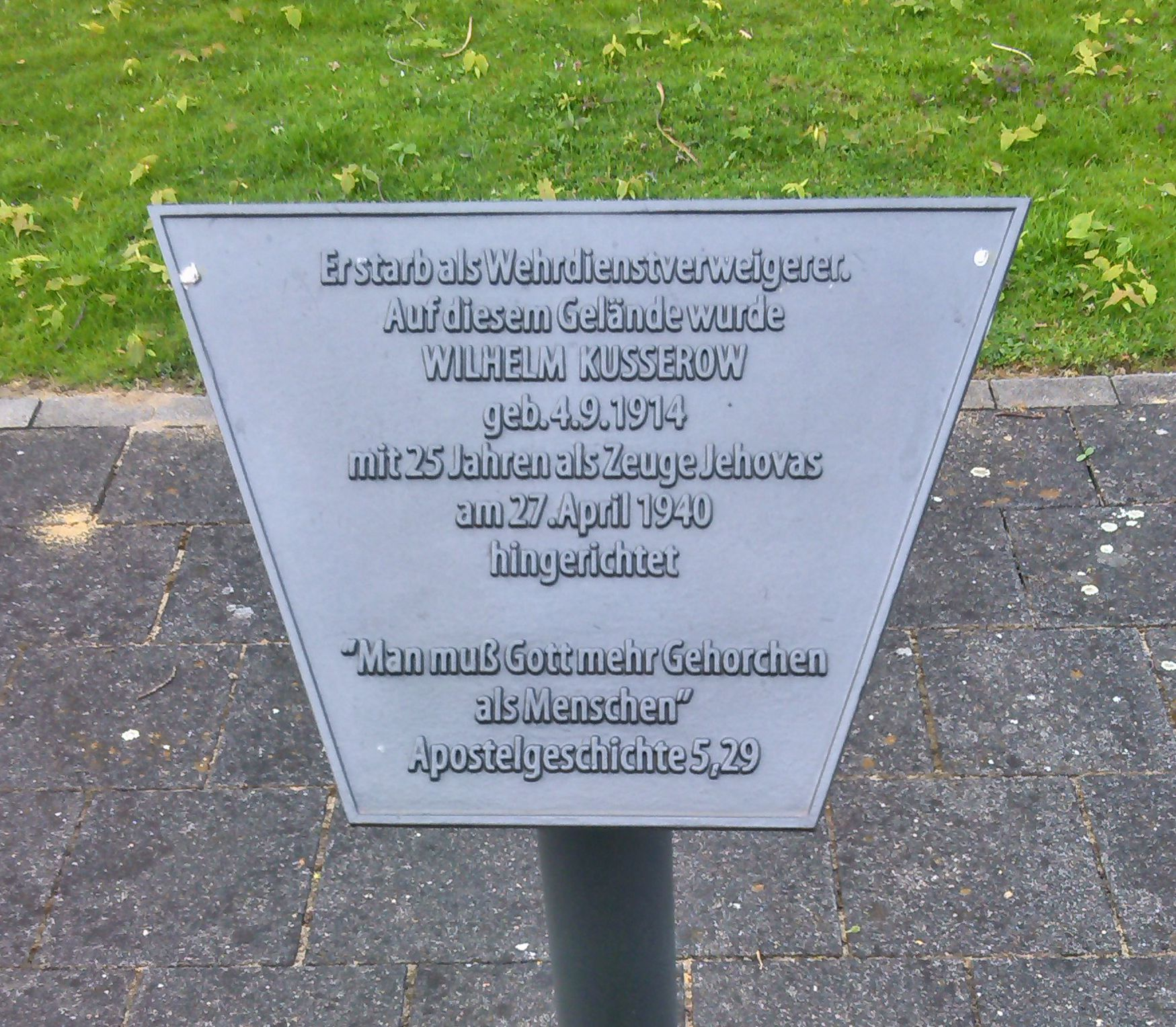 Gedenktafel für Wilhelm Kusserow, Kriegsdienstverweigerer